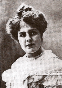 Dolores de las Carreras, directora de la Escuela Normal de Mujeres entre 1902 y 1904, e impulsora de la enseñanaza en lenguas extranjeras en la educación pública argentina